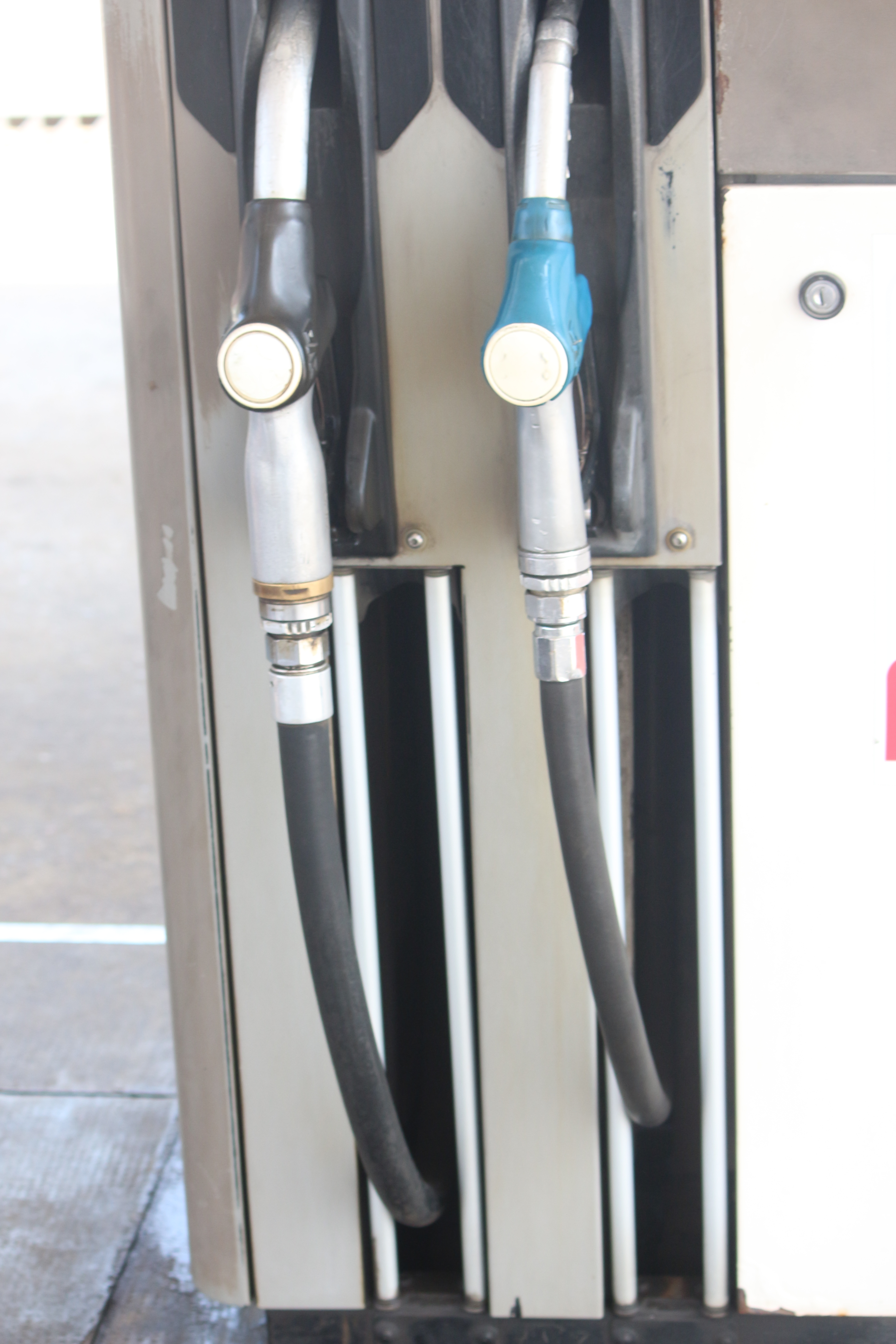 Une pompe à essence dans une station service à Douala This is an image with the theme "Africa on the Move or Transport" from: Cameroon